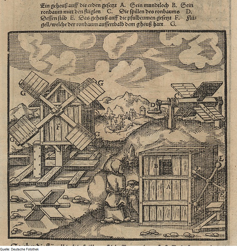 Original image description from the Deutsche Fotothek Bergwerk & Bergbau & Grubenbewetterung & Bewetterung & Wetterführung & Windfang & Wetterrad & Spille